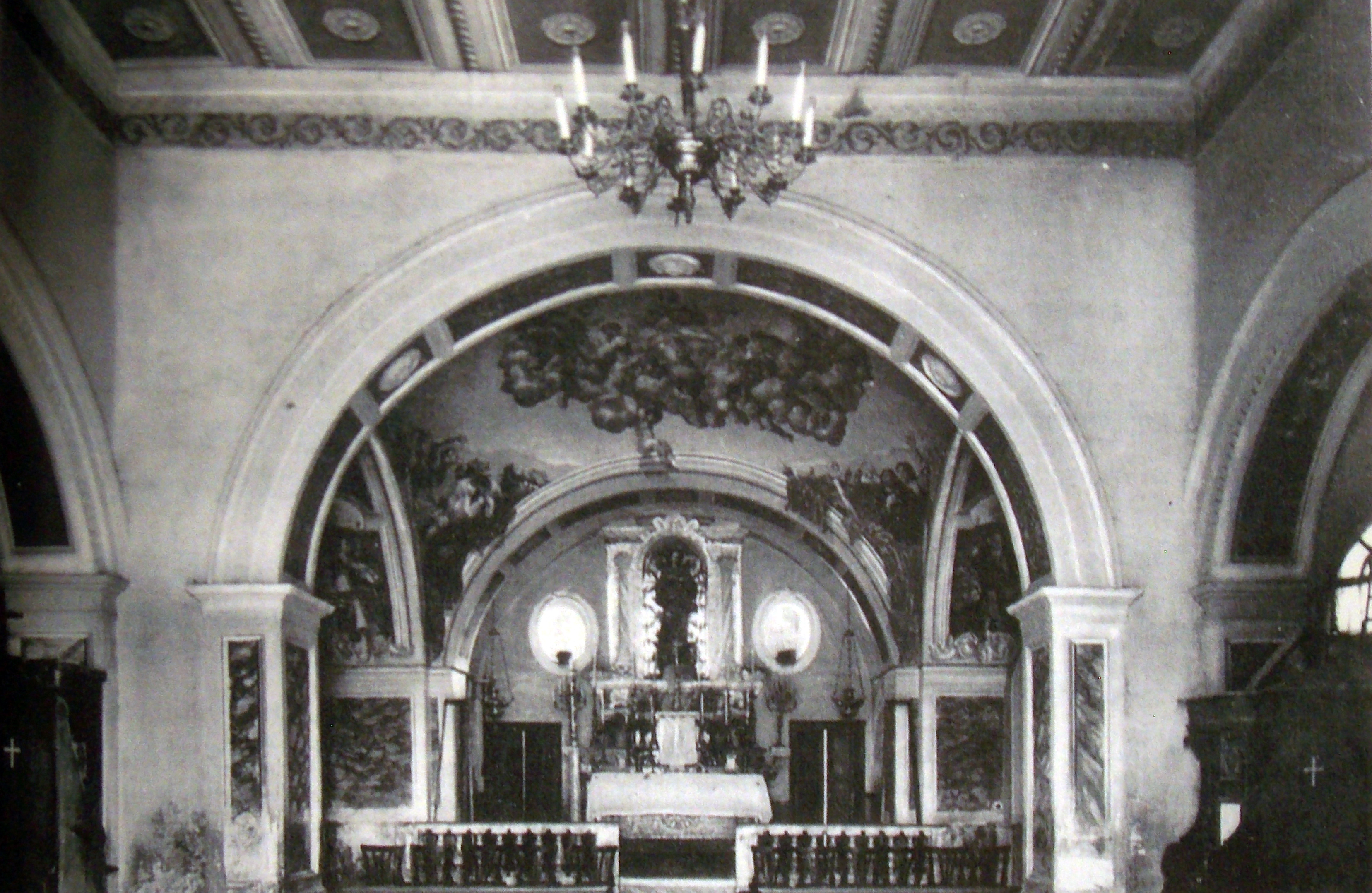 L'interno della chiesa di Santa Maria dei Greci di Molinara (BN) prima del terremoto del 1962. Da Fiorangelo Morrone, La Terra della Molinara e la chiesa di S. Maria dei Greci, in Campania Sacra, vol. 31, 2000, pp. 293-316.